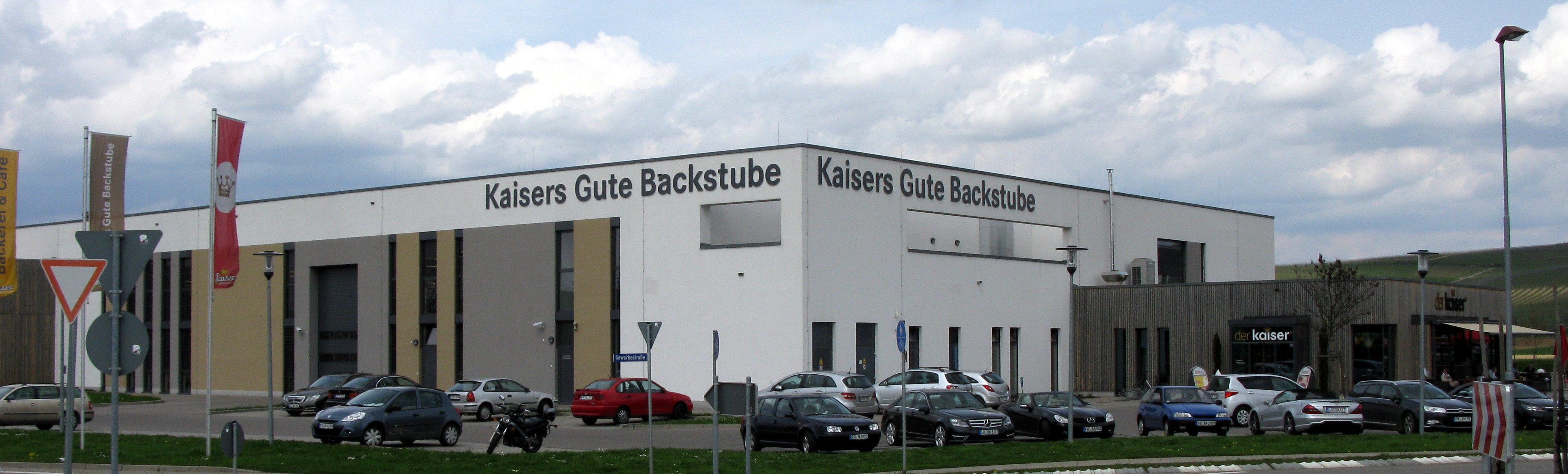 Hauptsitz der Firma Kaisers Gute Backstube